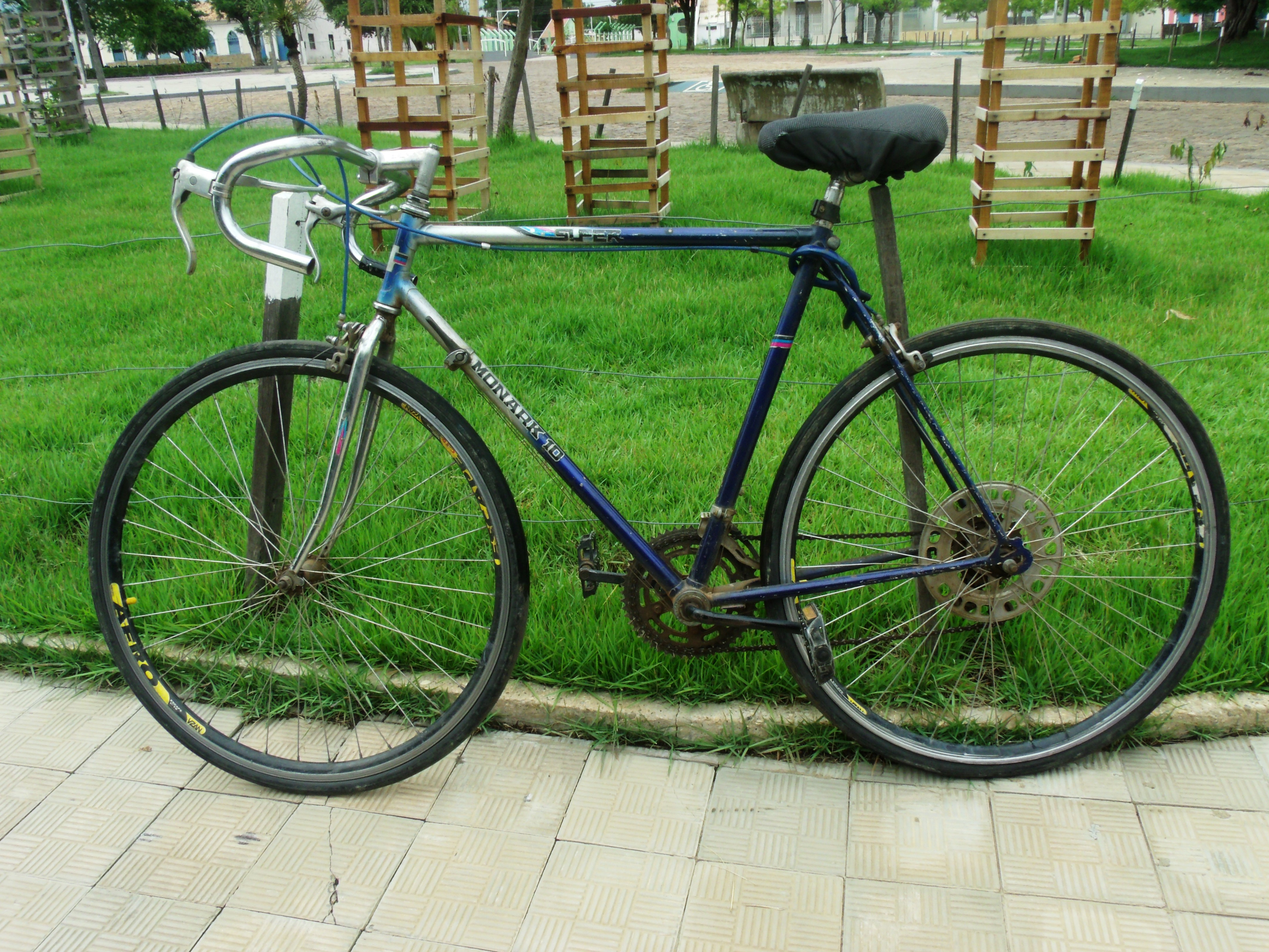 Bicicleta brasileira Monark 10, não sei o ano desse modelo.